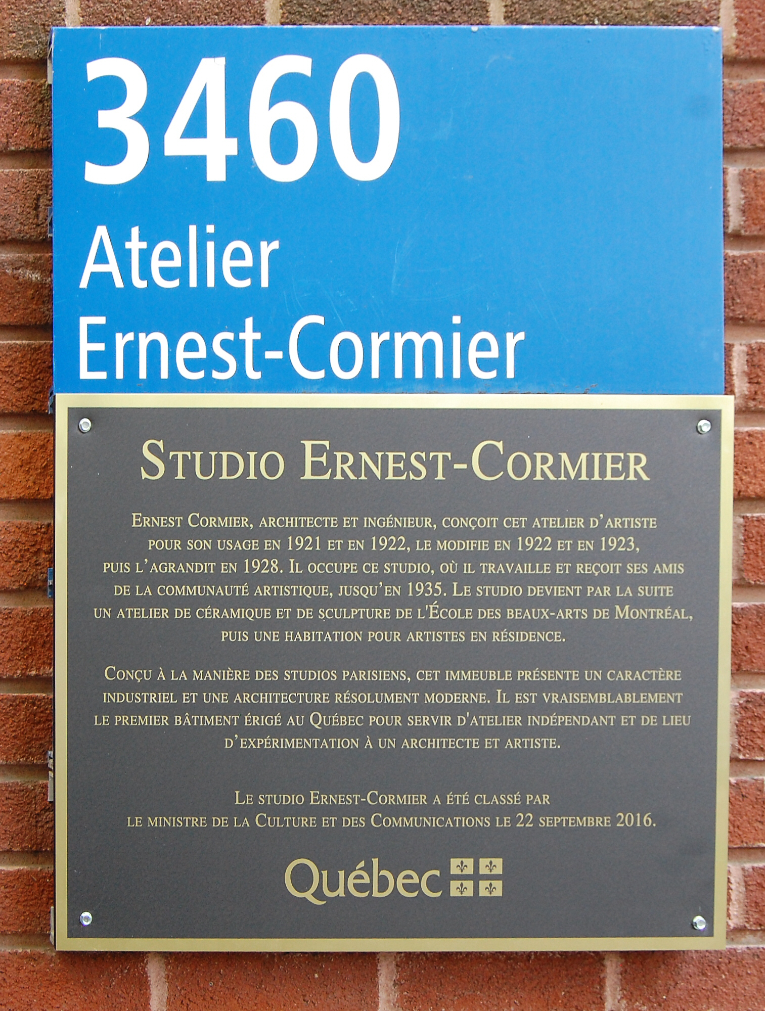 Plaque apposée au studio Ernest Cormier, commémorant le classement du 22 septembre 2016.